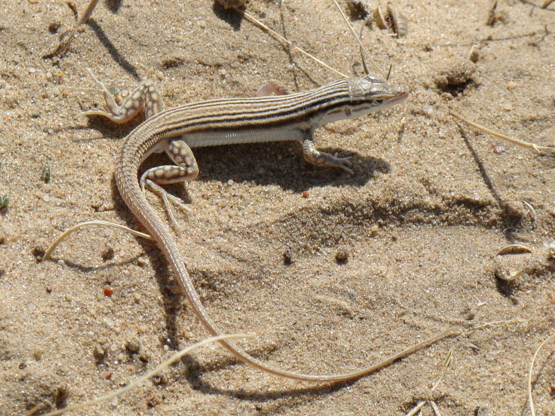 Линейчатая ящурка (Eremias lineolata). Окрестности города Байконур, левый берег Сырдарьи.